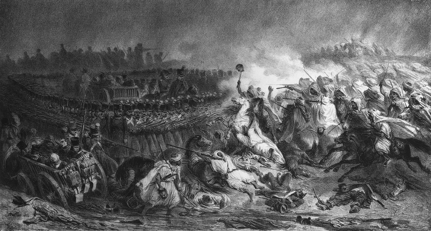 Episode de la retraite de Constantine en novembre 1836, le carré du maréchal Changarnier attaqué par les arabes.